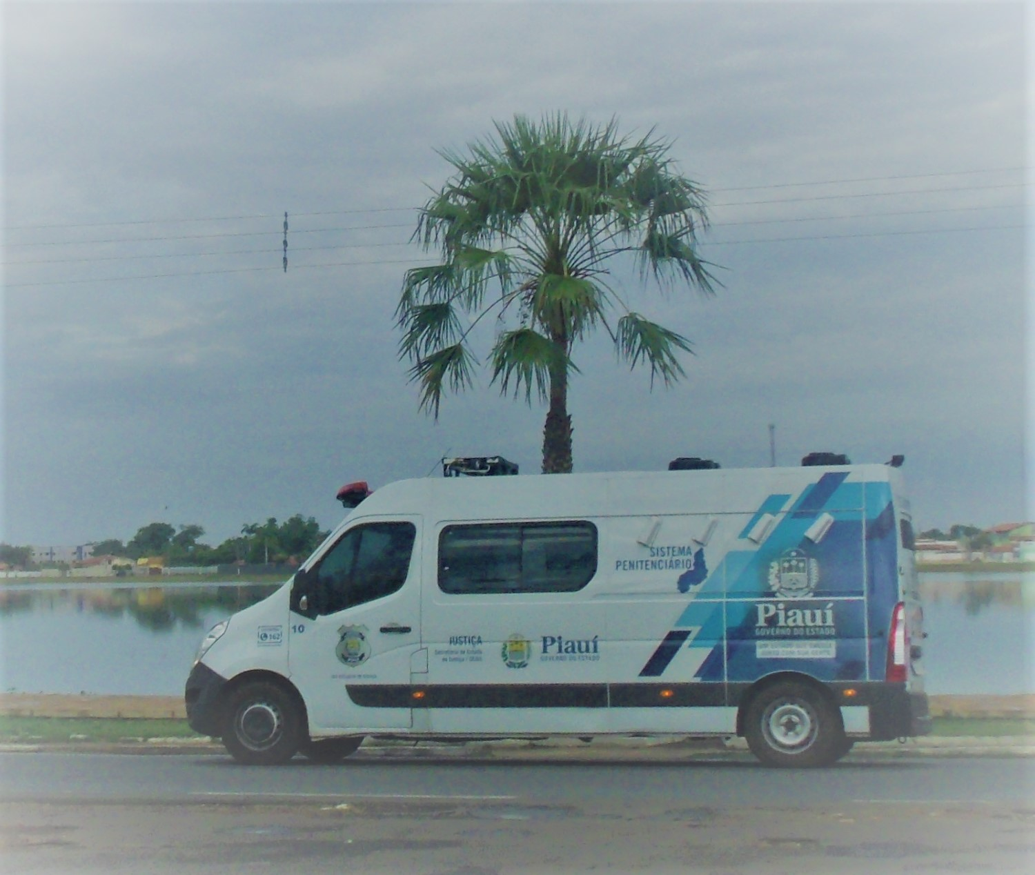 Carro do Sistema Penitenciário Nacional na BR-343.